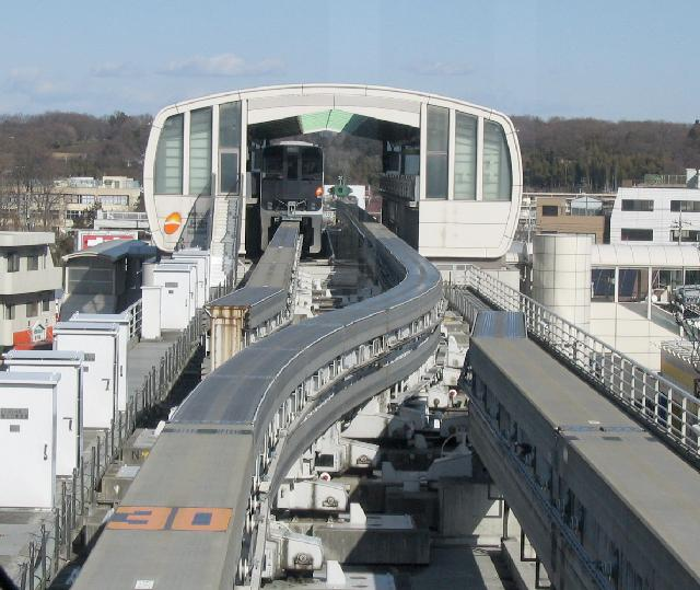 多摩都市モノレール線上北台駅